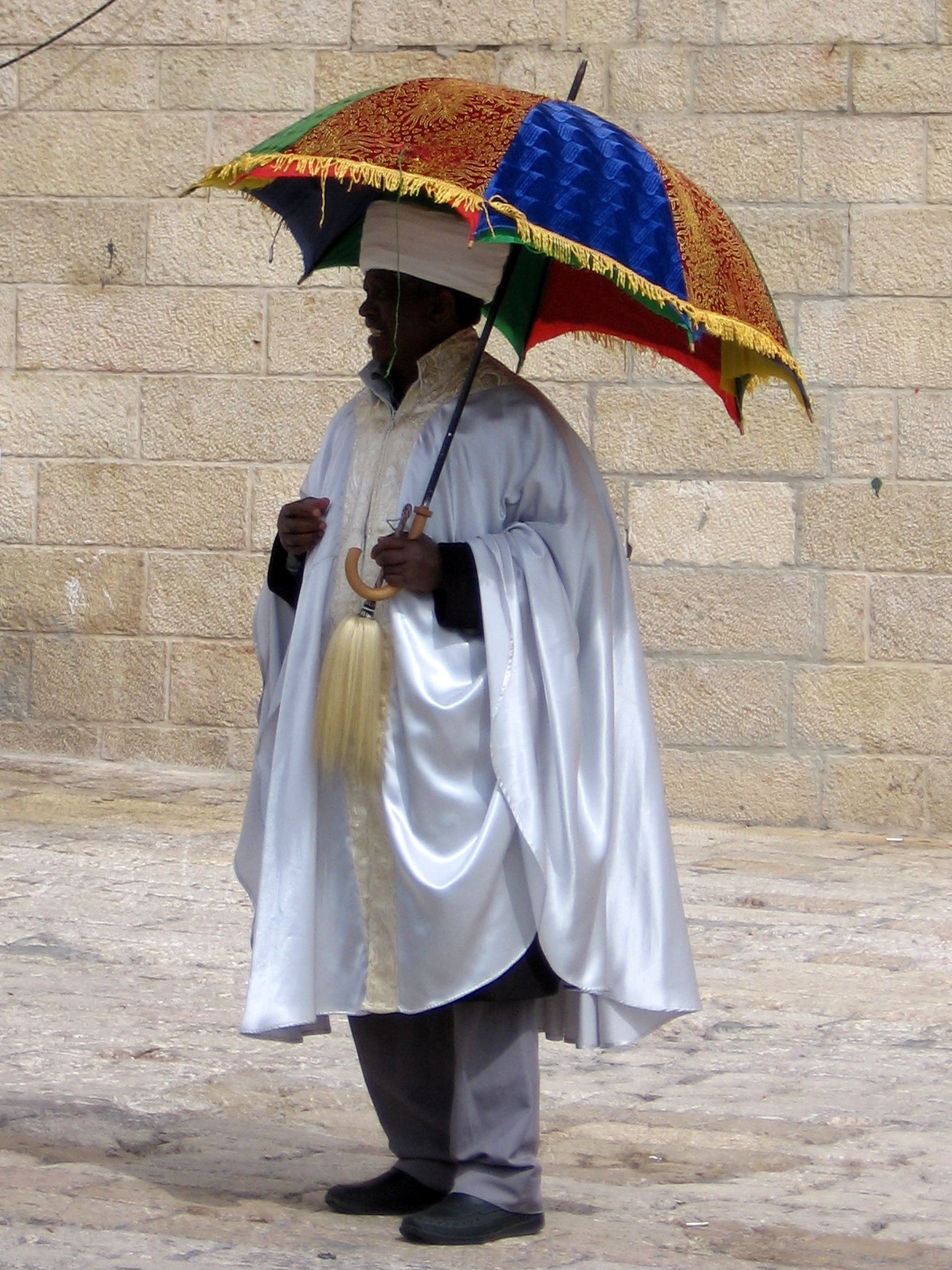 כהן ברחבת הכותל המערבי. פסח תשע"ב